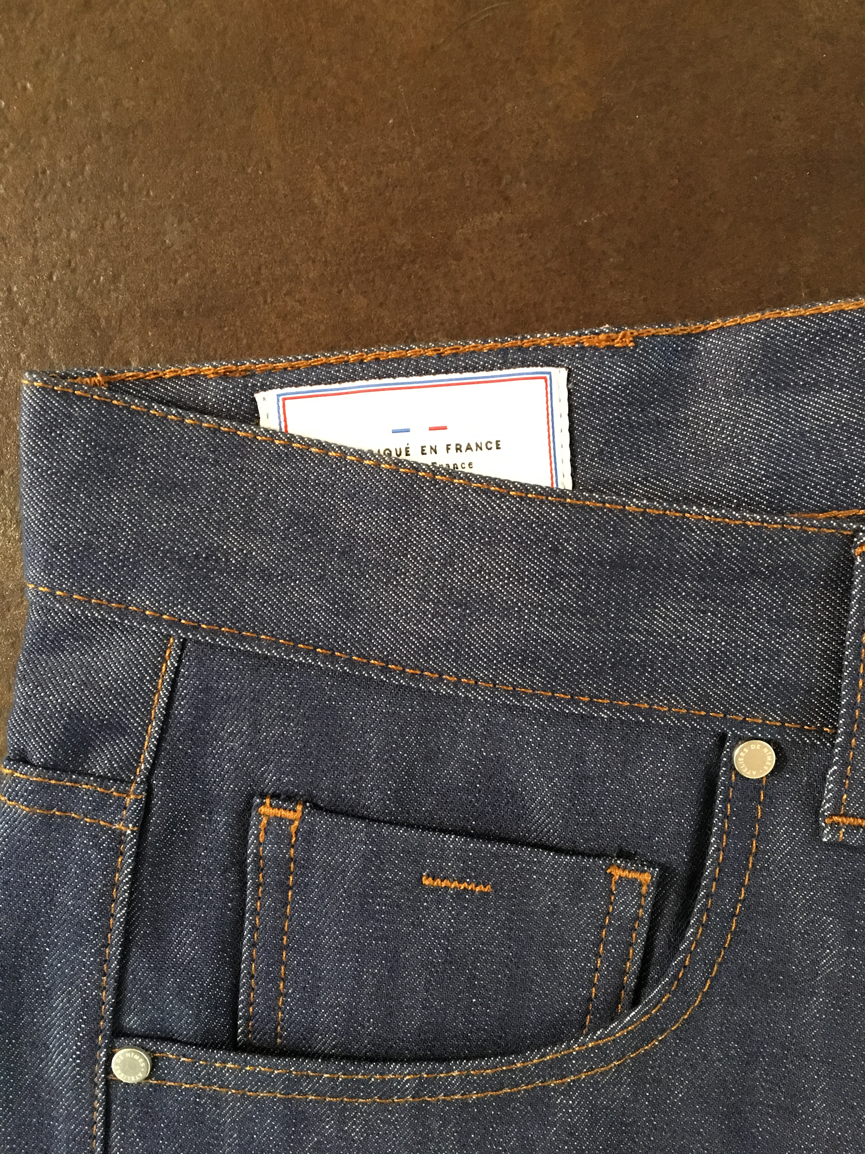 Rivet surJeans Ateliers De Nîmes en toile selvedge 13oz